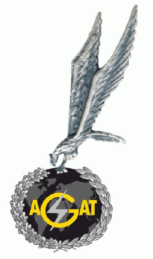 JW AGAT – odznaka pamiątkowa – 2012, Polska.